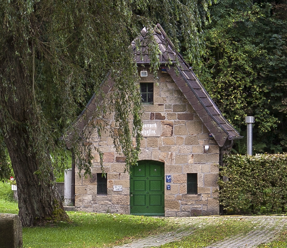 Pumpengebäude (Thiesmeiersche und Meiersche Quellen) in Wüsten (Bad Salzuflen). This is a photograph of an architectural monument.